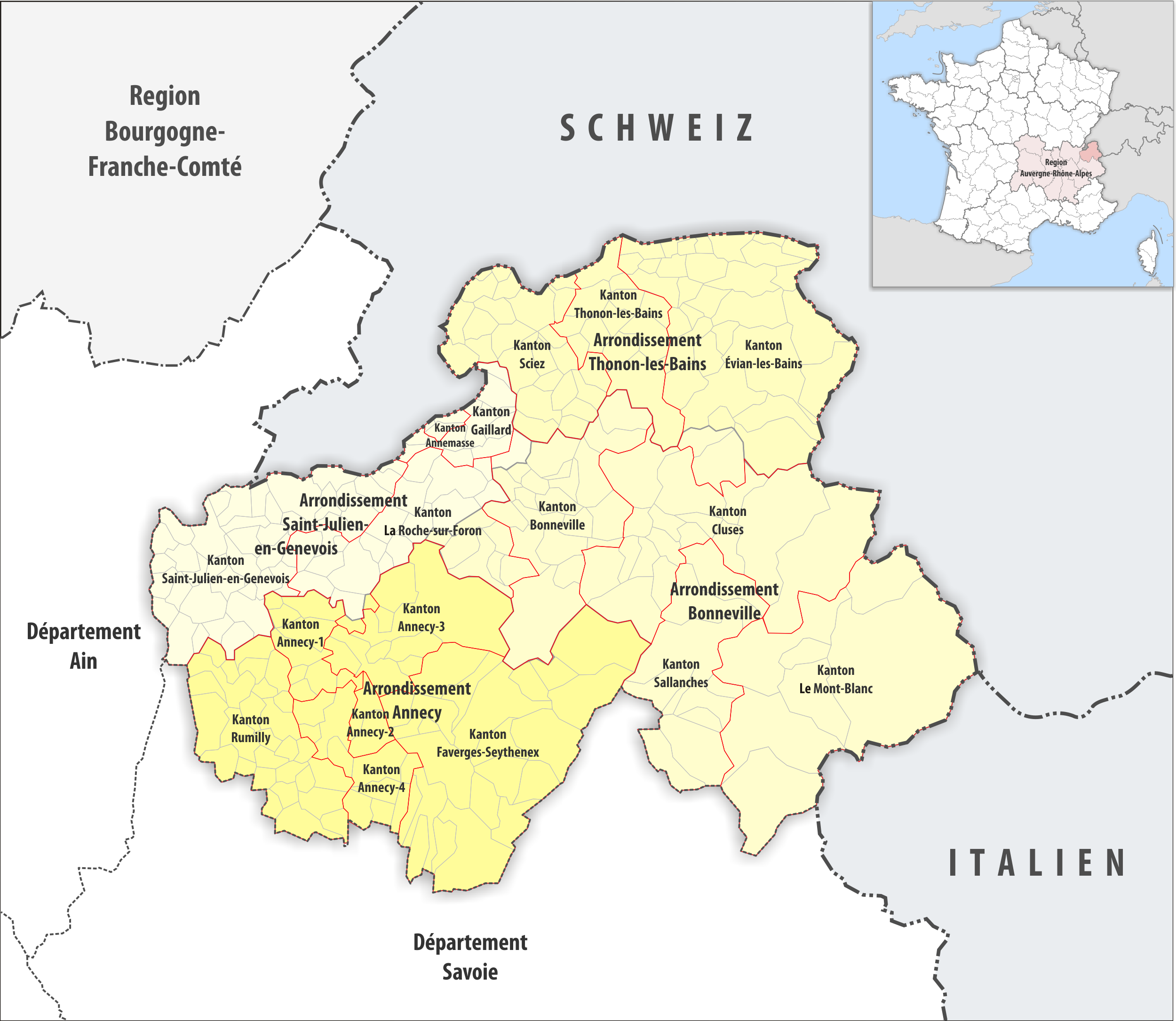 Gemeinden, Kantone und Arrondissemente im Departement Haute-Savoie